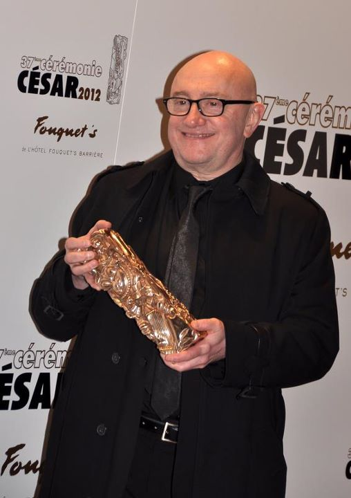 Michel Blanc à la cérémonie des César